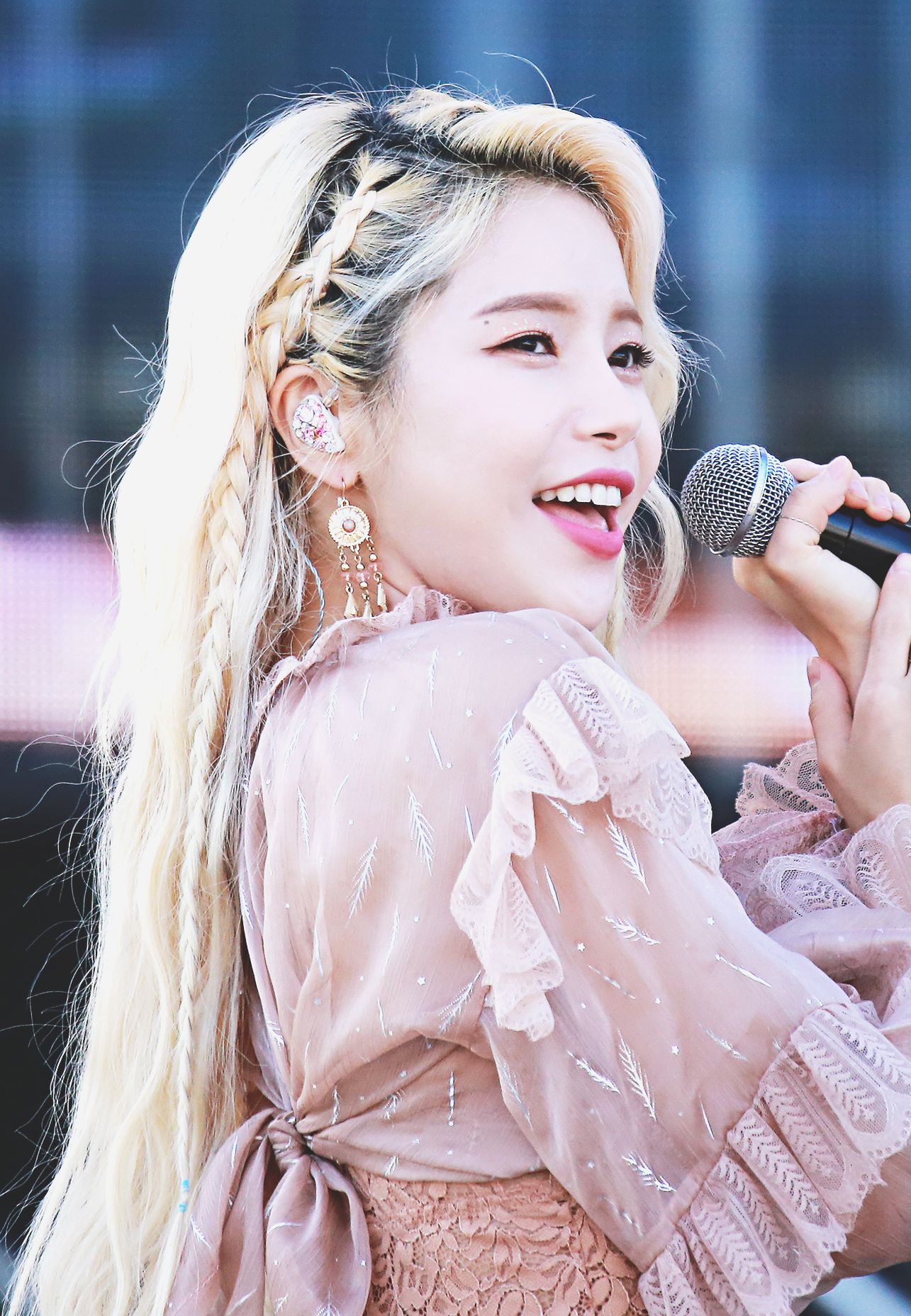 180519_마마무